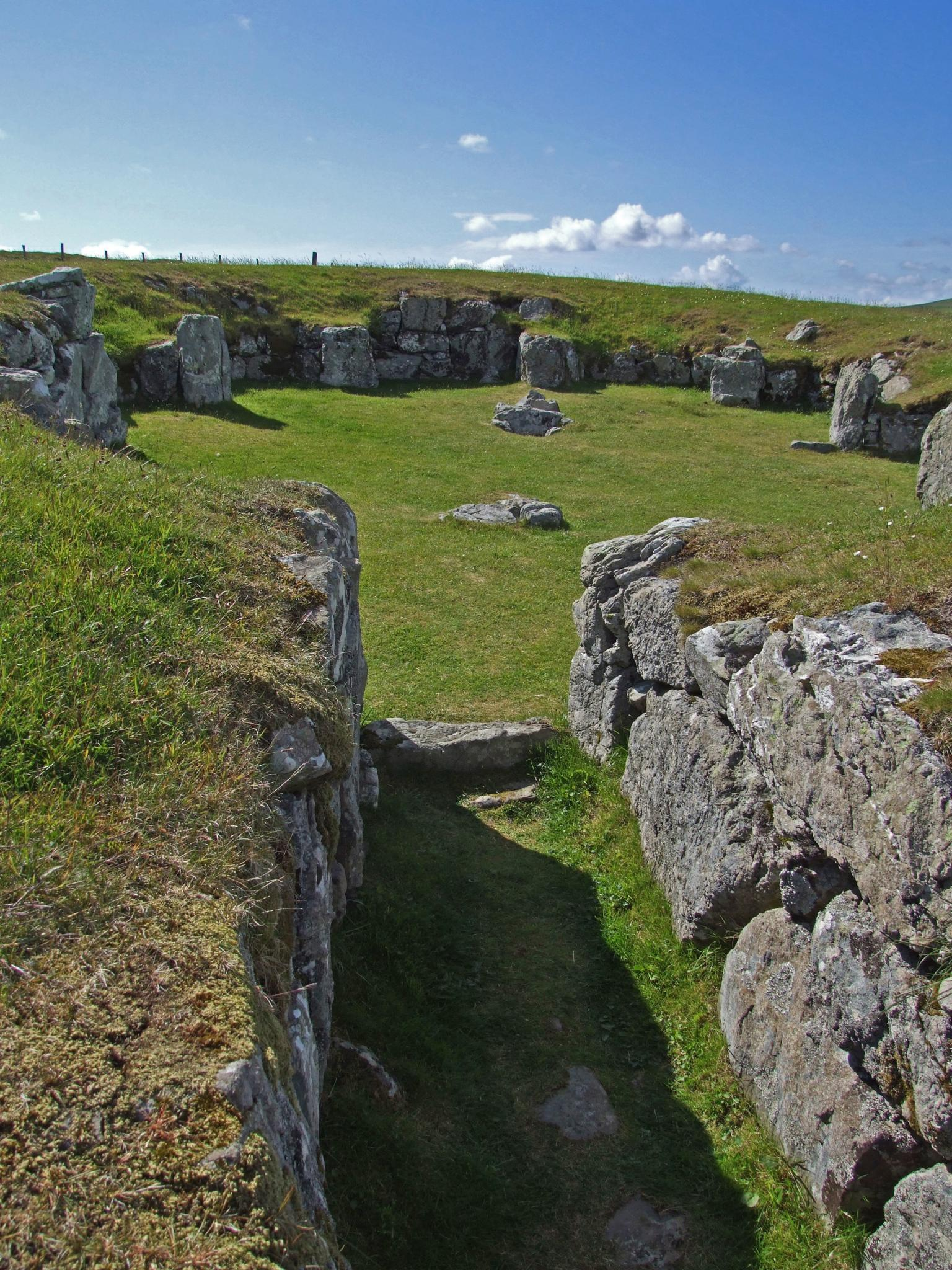 From entrance